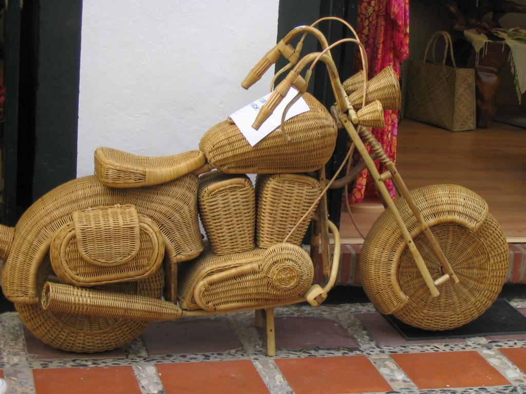 Moto hecha en rattán.